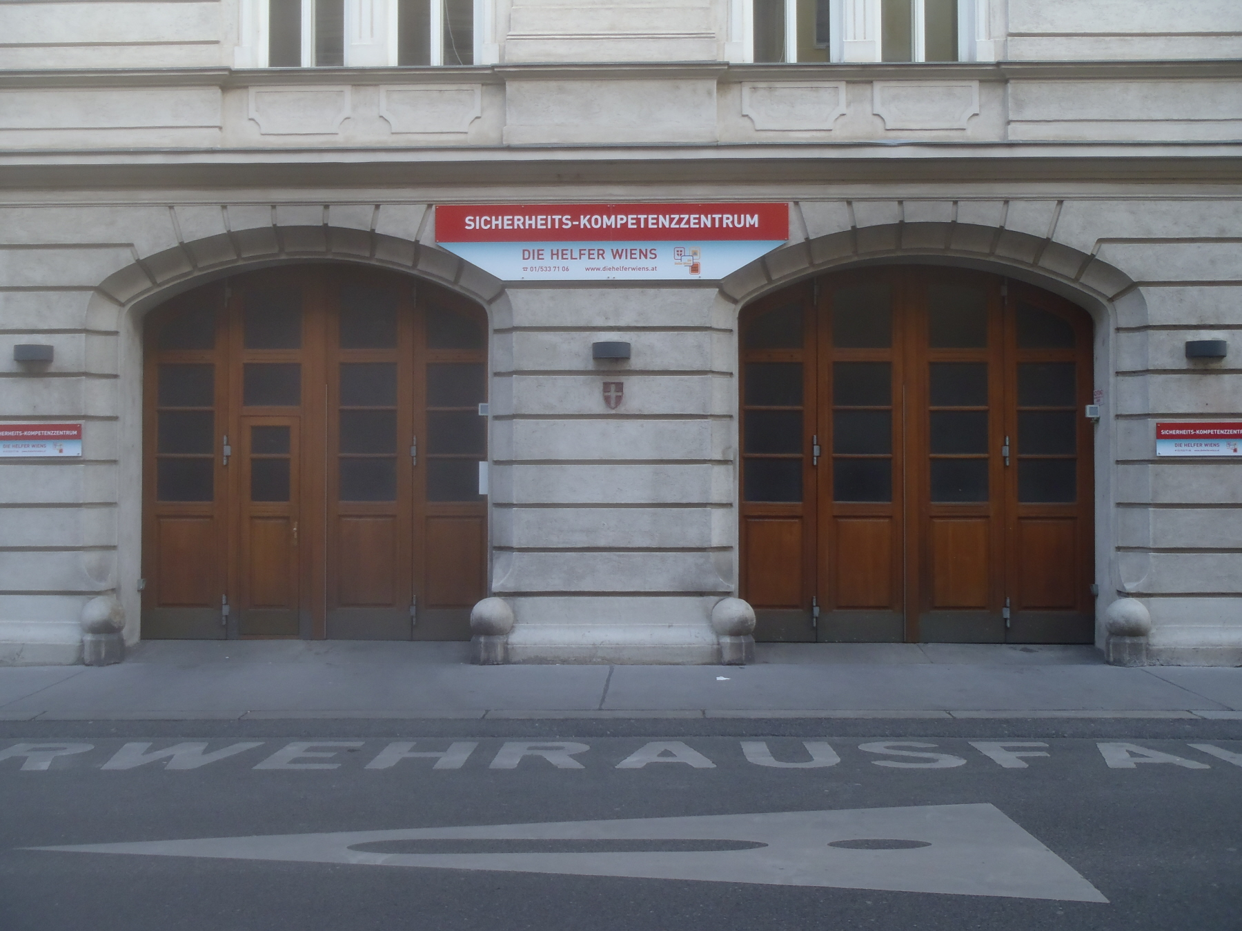 ehemalige Feuerwache Neubau in der Hermanngasse in Wien-Neubau – jetzt Sicherheitskompetenzzentrum